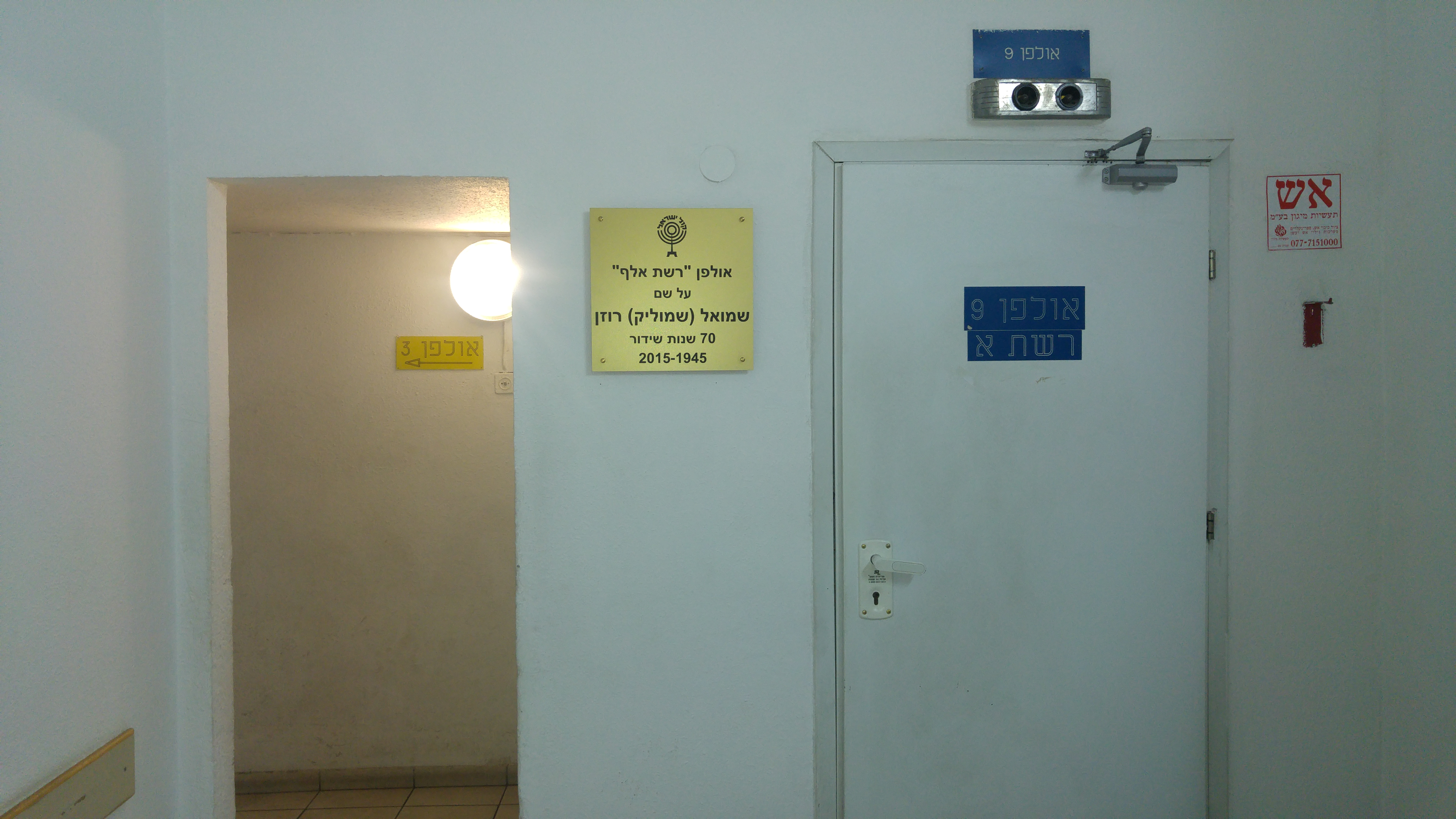 מתחם רשות השידור בתל אביב, ליד הקריה ומתחם שרונה.